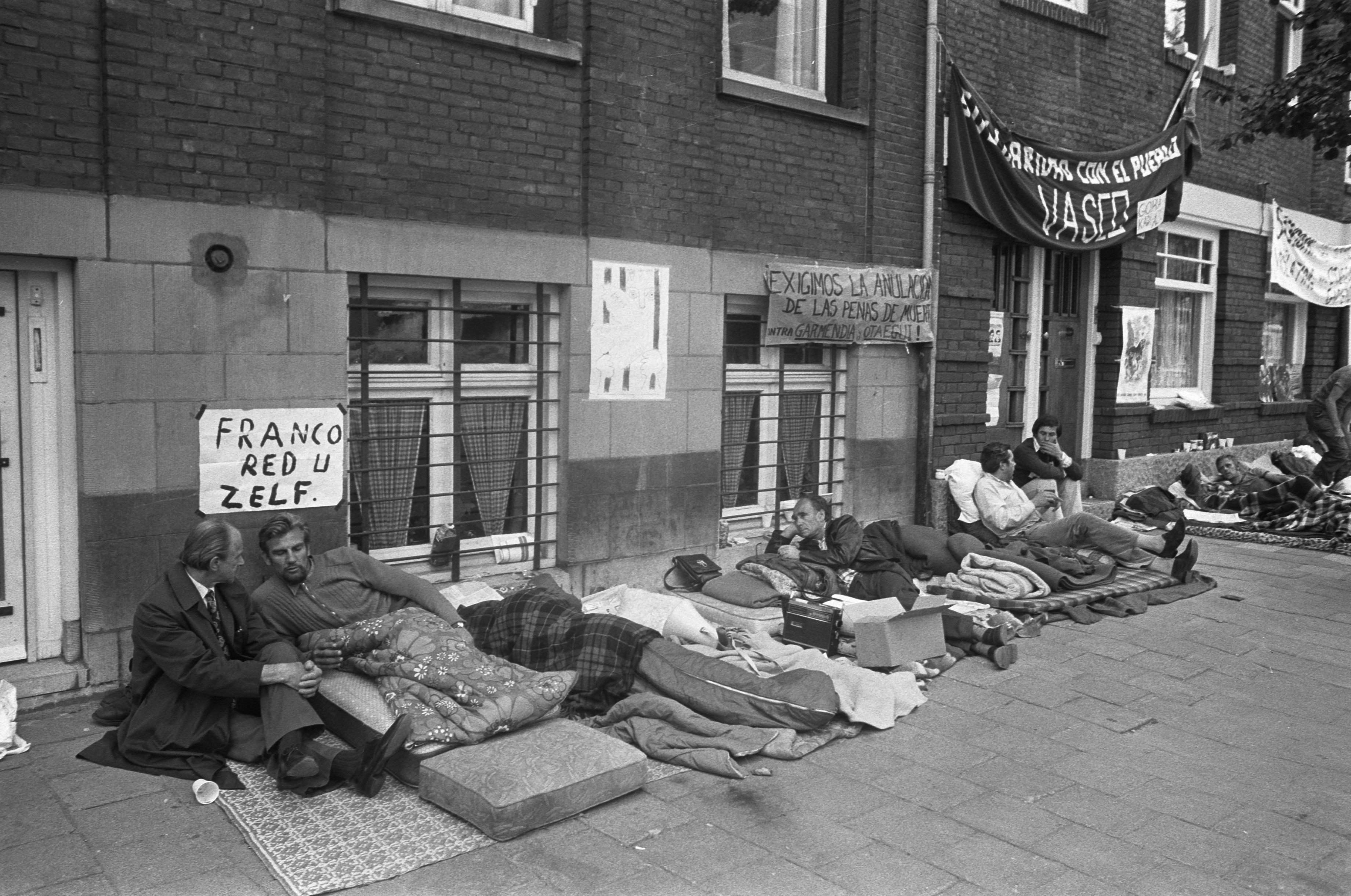 Collectie / Archief : Fotocollectie Anefo Reportage / Serie : Hongerstaking van Spaanse gastarbeiders voor het Spaanse consulaat in Amsterdam i.v.m. een doodvonnis in Spanje over twee Basken Beschrijving : De hongerstakkers protesteren met anti Franco leuzen in eigengemaakte slaapplekken voor het consulaat Datum : 2 september 1975 Locatie : Amsterdam, Noord-Holland Trefwoorden : buitenlandse werknemers, consulaten, hongerstakingen, slapen, spandoeken Persoonsnaam : Franco Fotograaf : Fotograaf Onbekend / Anefo Auteursrechthebbende : Nationaal Archief Materiaalsoort : Negatief (zwart/wit) Nummer archiefinventaris : bekijk toegang 2.24.01.05 Bestanddeelnummer : 928-1331